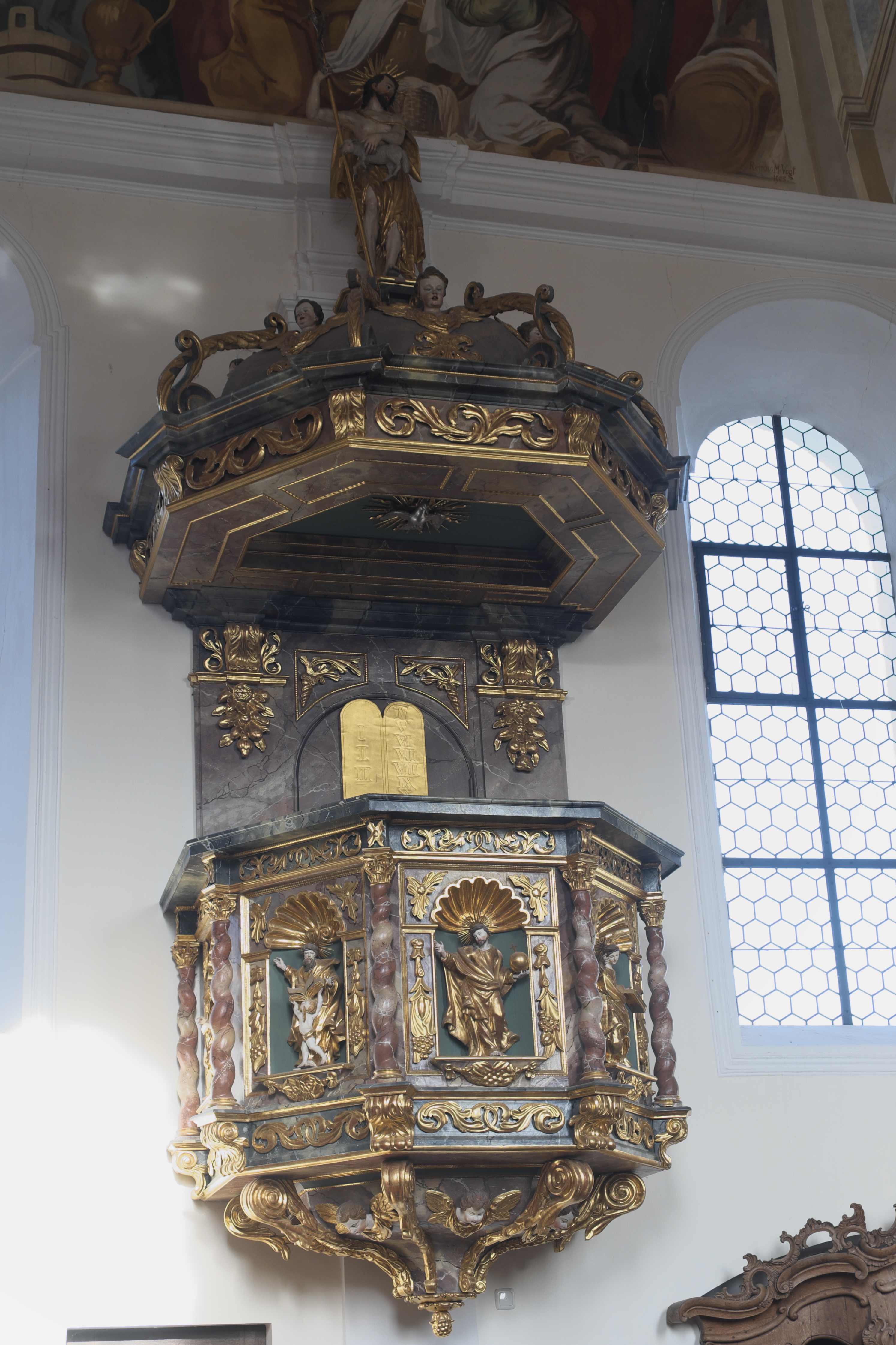 Katholische Pfarrkirche Mariä Heimsuchung in Gosseltshausen (Wolnzach) im Landkreis Pfaffenhofen an der Ilm (Bayern/Deutschland), Kanzel aus dem späten 17. Jahrhundert mit den Figuren der Evangelisten und Jesus Christus am Kanzelkorb und Johannes dem Täufer auf dem Schalldeckel